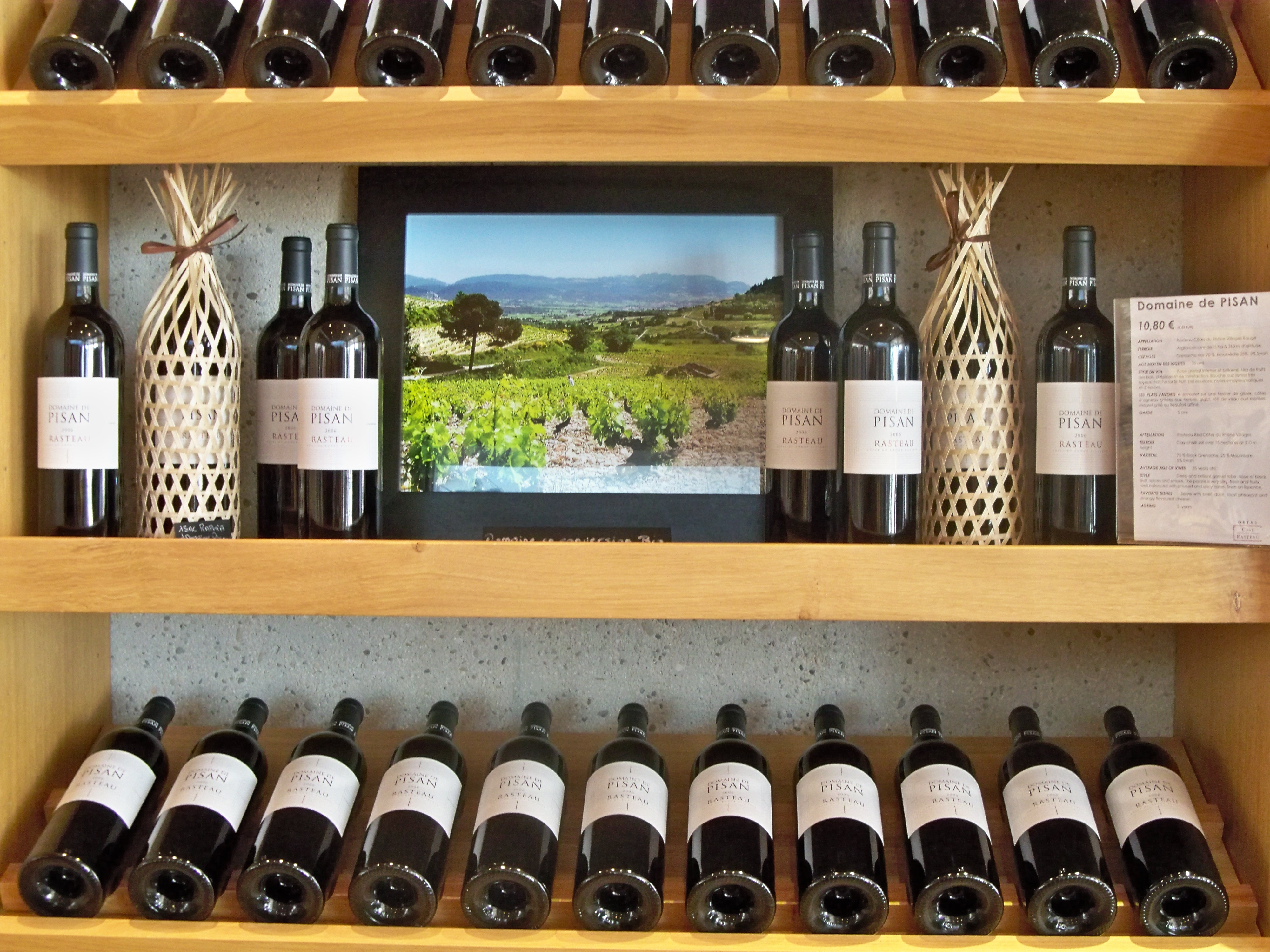 Bouteilles du Domaine de isan à Rasteau, Vaucluse, France